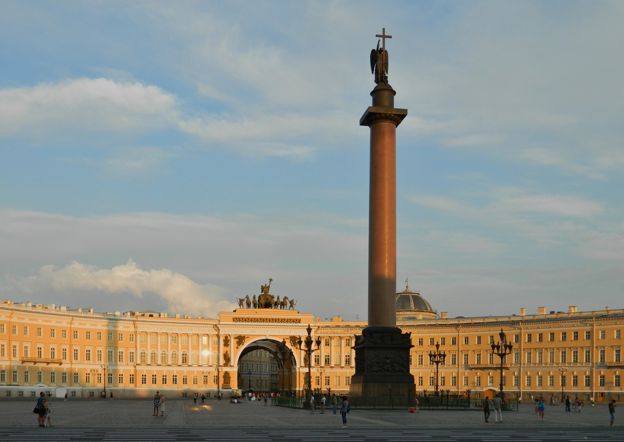 Palatsiaukio on Pietarin kaupungin keskusaukio. Se sijaitsee Nevan eteläpuolella Amiraliteetin prospektin sekä Millionnaja-kadun ja Moikan välillä. Aukion pinta-ala on 8 hehtaaria